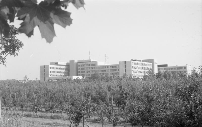 31.7.1990 Bundeskriminalamt, Außenstelle Meckenheim-Merl (Personen- und Objektschutz), Paul-Dickopf-Str. 2